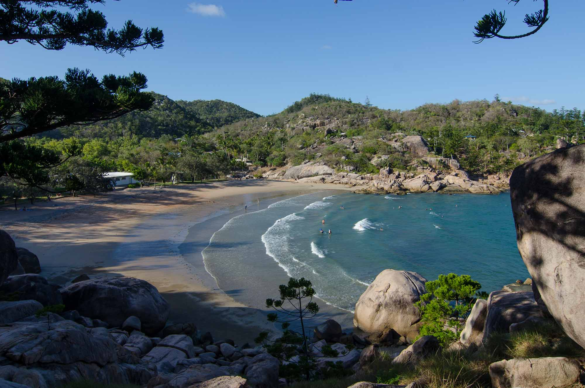 Alma Bay